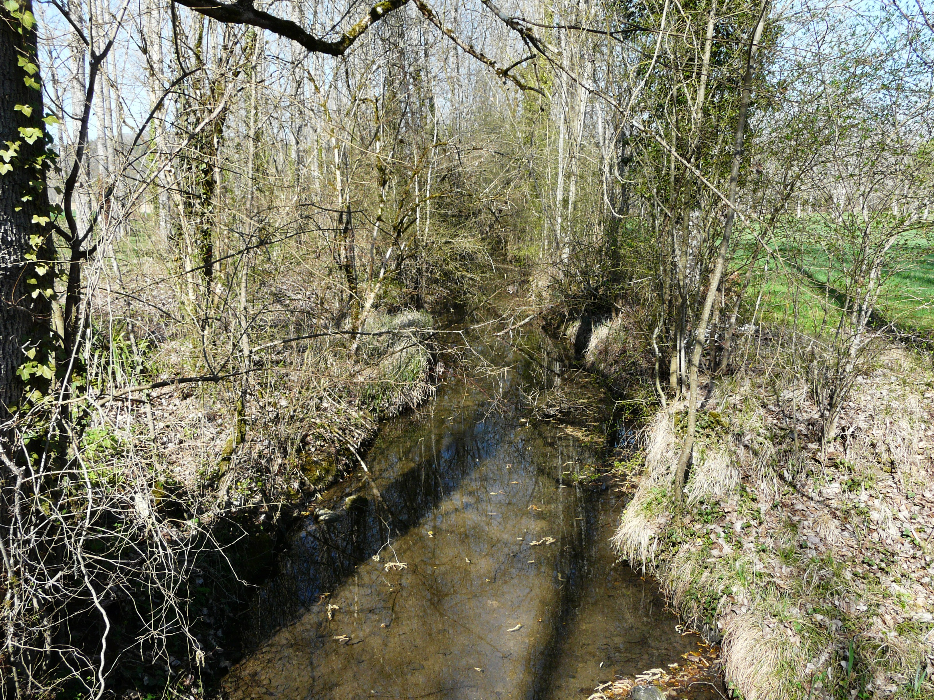 Le Boulou au nord du village de Saint-Crépin-de-Richemont, Dordogne, France. Vue prise en direction de l'amont.